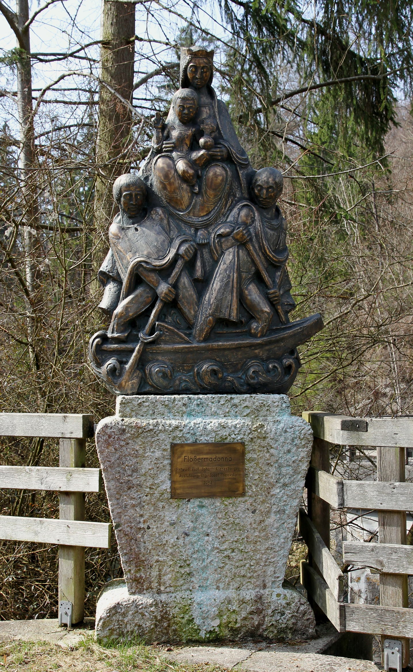 Die Flößermodanna am rechten Ufer des Traunfalls. Nach einen Entwurf von Prof. Johann Kienesberger und von Ing. Josef Prizovsky ausgeführt. Im August 2012 wurde die Bronze-Statue von unbekannten Tätern gestohlen.